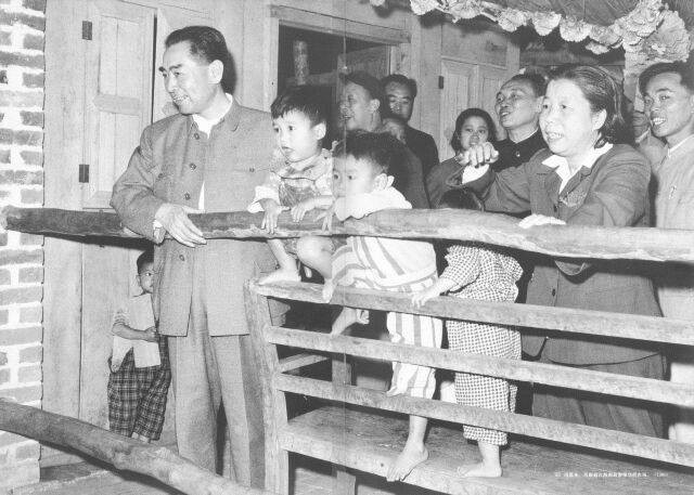 1960年，周恩来、邓颖超在海南岛参观华侨农场